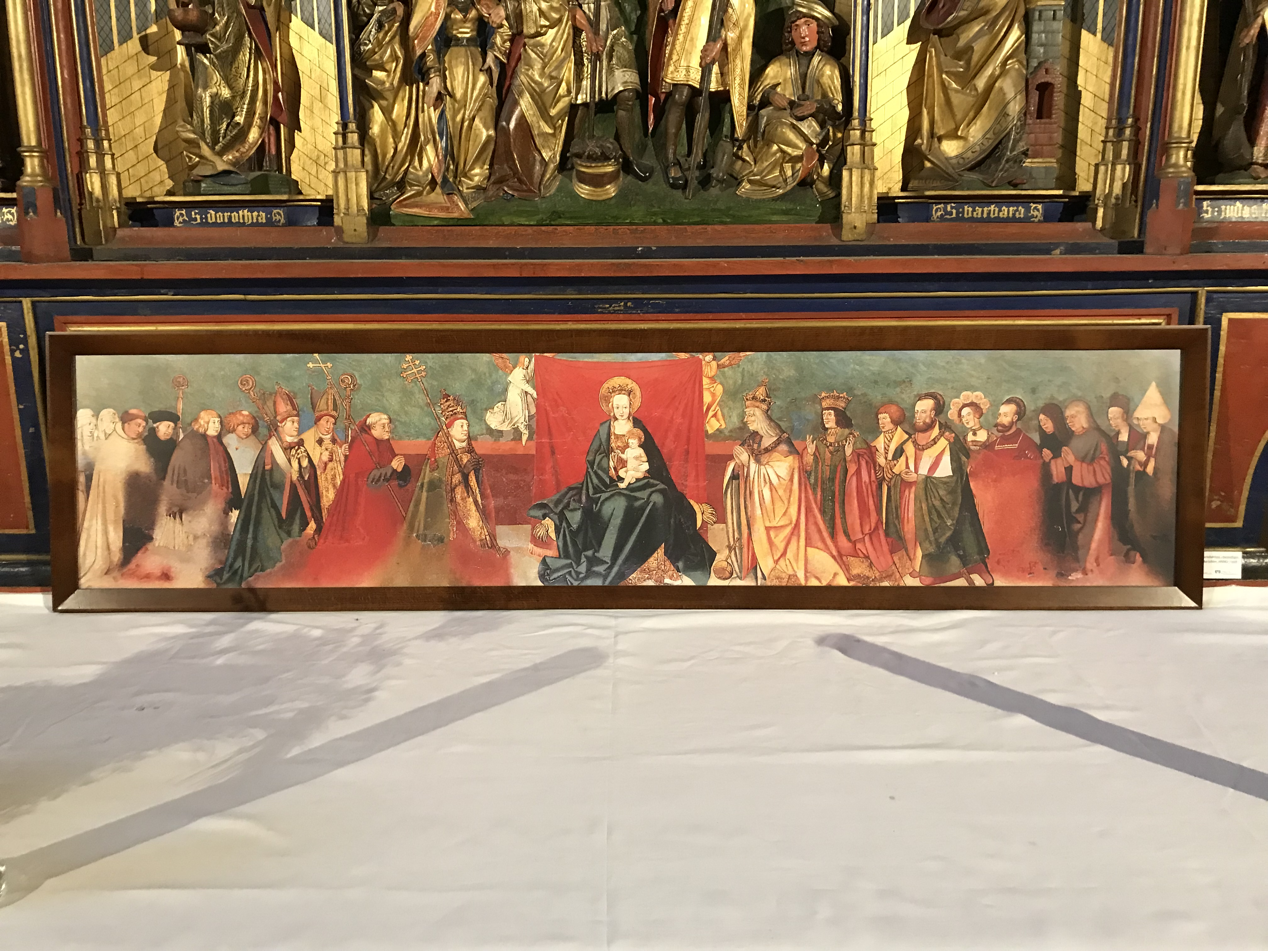 Nikolaus II von Pentz, Pentz Predella Kloster Rehna January 2020